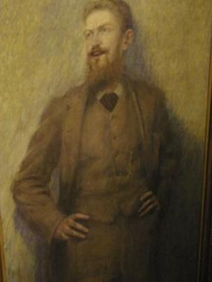 Bertha Newcombe George Bernard Shaw 1892 5ft (1.5 m) high and 3ft 2in (0.9 m) wide„Shaw - fulllength, with his rea-gold hair an laughing blue eyes and his mouth slight open..., a powerful picture in which the love of the woman had given genius to the artist,,,“, Beatrice Webb, Diary, 9. März 1897